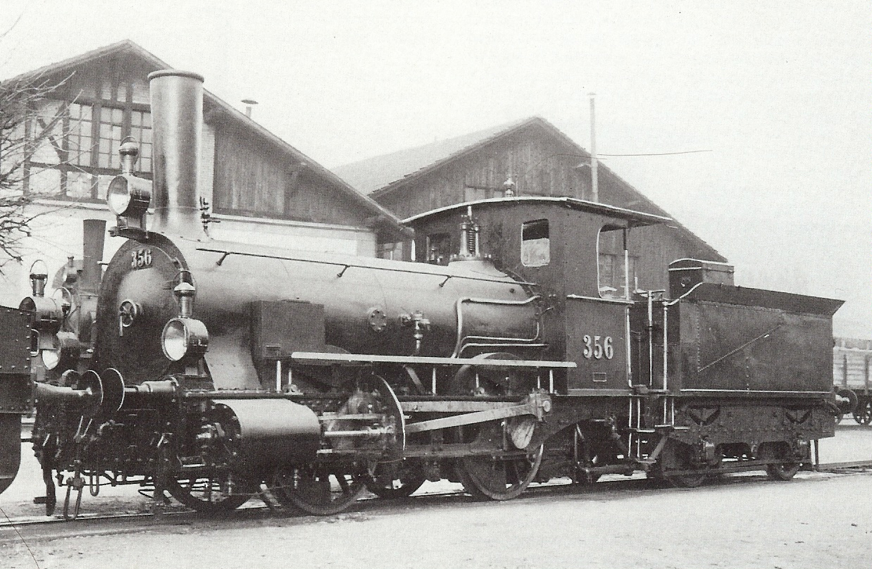 Dampflokomotive der NOB Bauart C 2/2 Nummer 356.